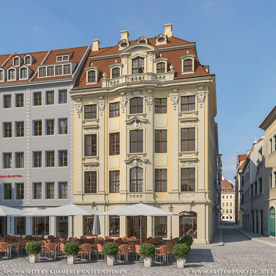 Das Dinglingerhaus am Jüdenhof nach seinem Wiederaufbau (Visualisierung)